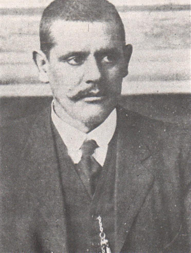 General Juan M. Banderas